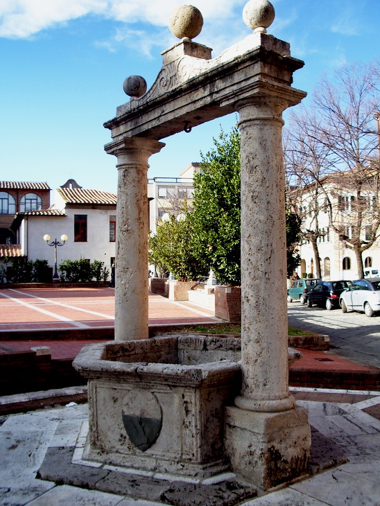 Il Pozzo dello Spedale in Piazza San Francesco a Grosseto